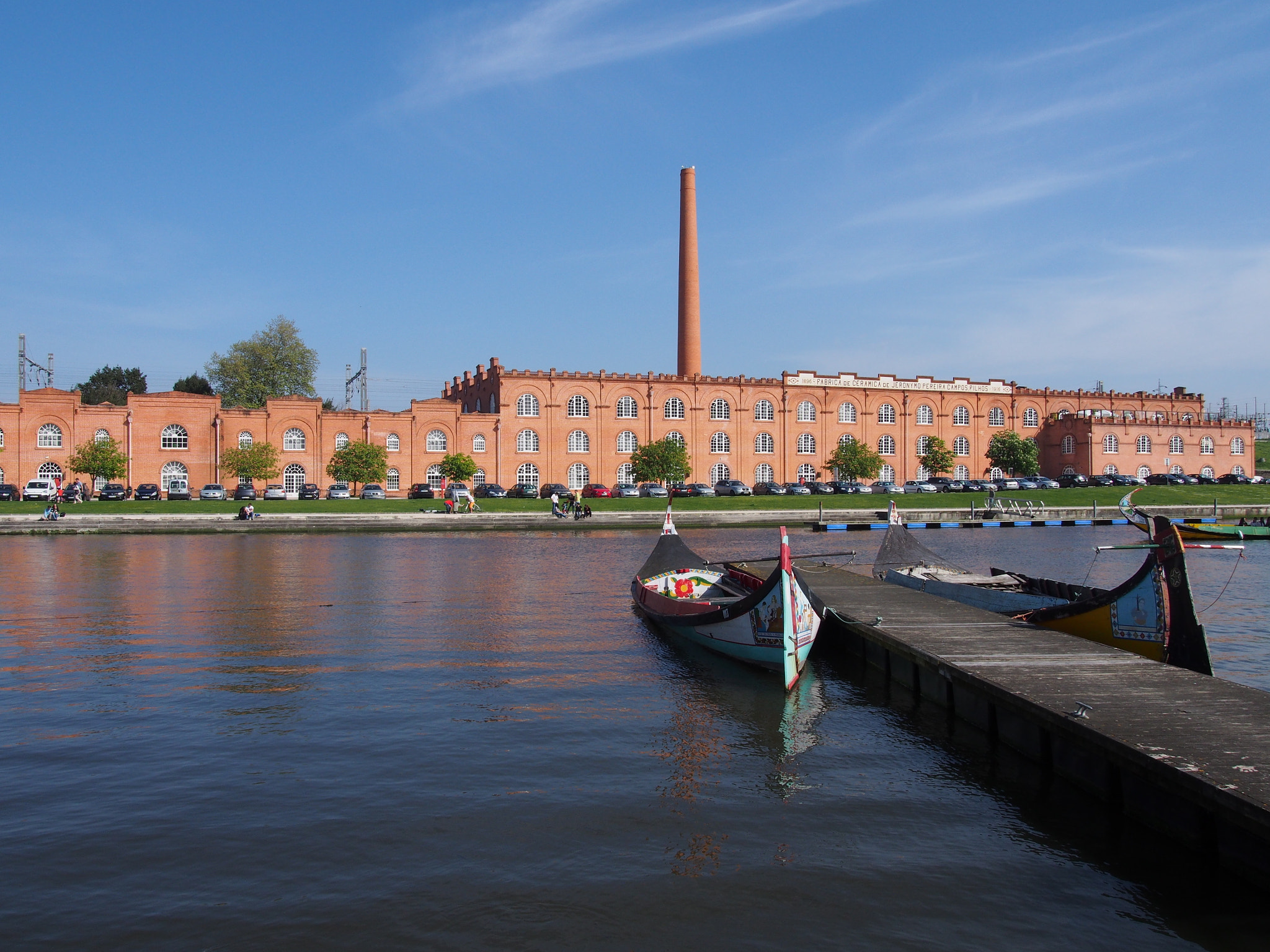 500px provided description: Aveiro Moliceiro boats [#water ,#boat ,#river ,#portugal ,#barco ,#moliceiro ,#Portugal ,#Aveiro]